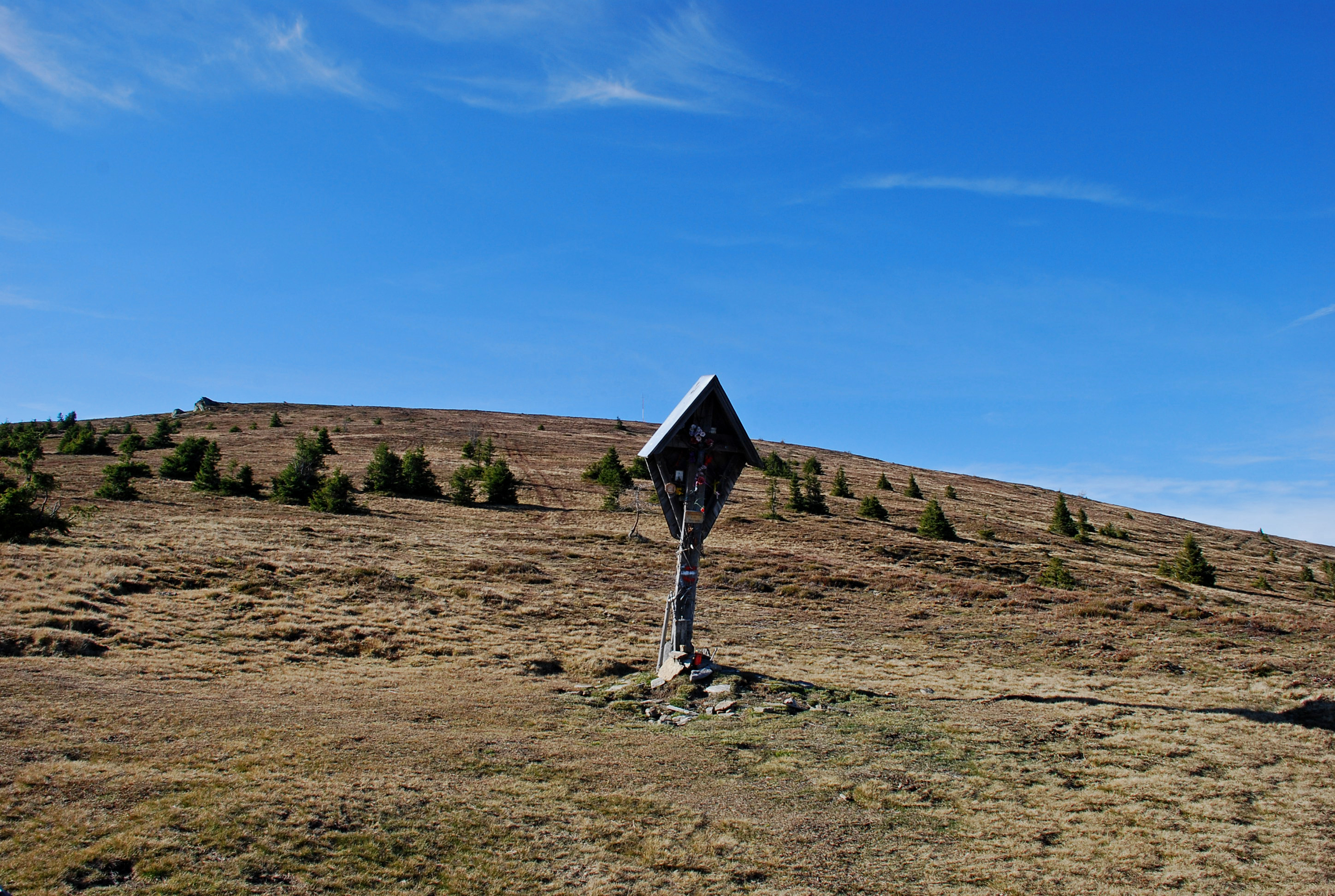 Handhöhkreuz, auch Handalmkreuz genannt: Wegkreuz auf dem Sattel zwischen Handalm und Glashüttenkogel in der Koralpe, Steiermark, Österreich. Das Kreuz bezeichnet jene Stelle, an der der Weg (früher eine Straße) von der Weinebene nach Osterwitz den Höhenrücken überquert, es bildet bei Schlechtwetter eine wichtige Wegmarke.